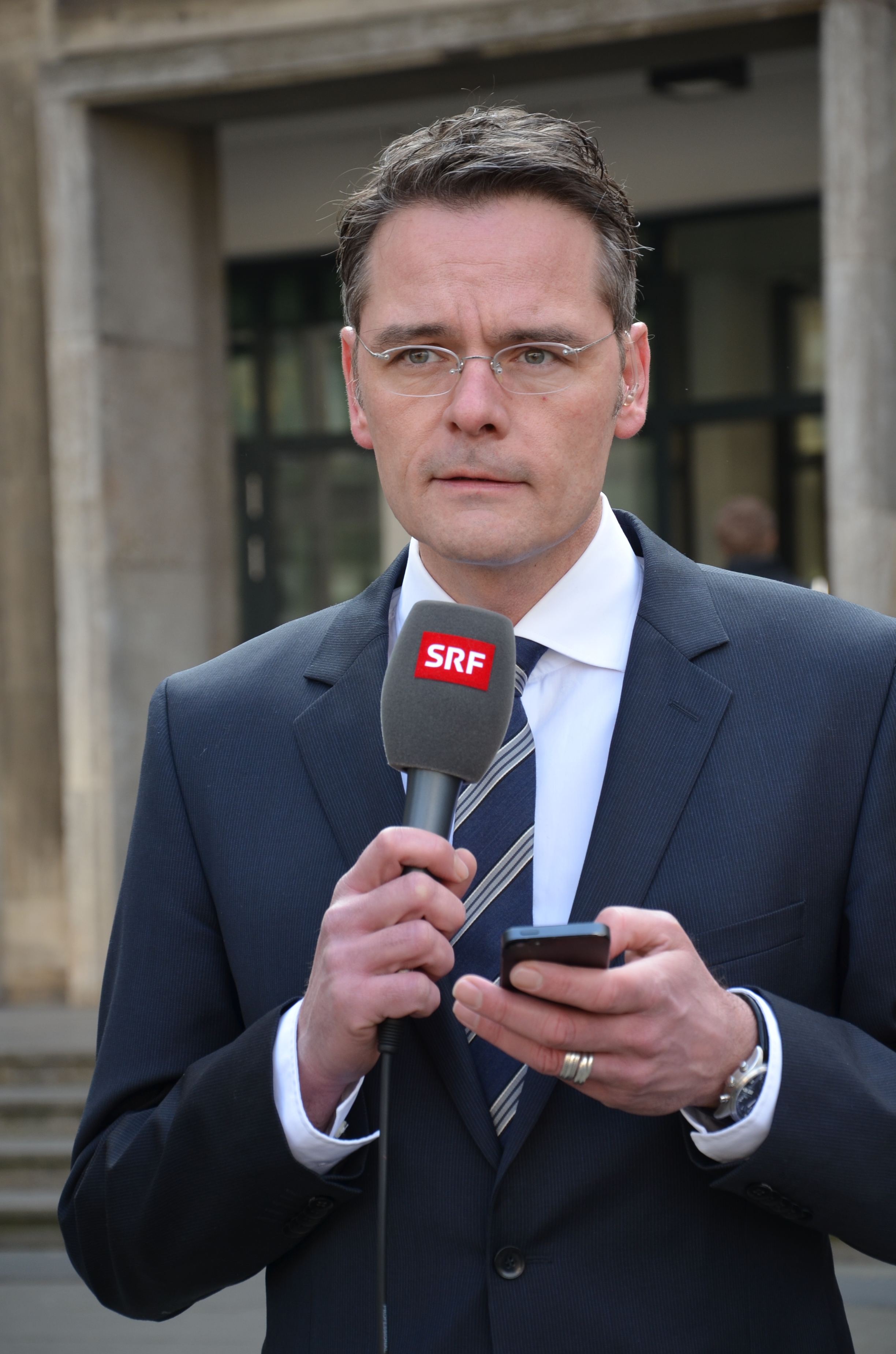 Stefan Reinhart, Deutschland-Korrespondent Chefredaktion TV für das Schweizer Radio und Fernsehen (SFR), hier vor dem Landgericht Hannover am Tag des Freispruches des deutschen Bundespräsidenten a.D. Christian Wulff und des Filmproduzenten David Groenewold ...